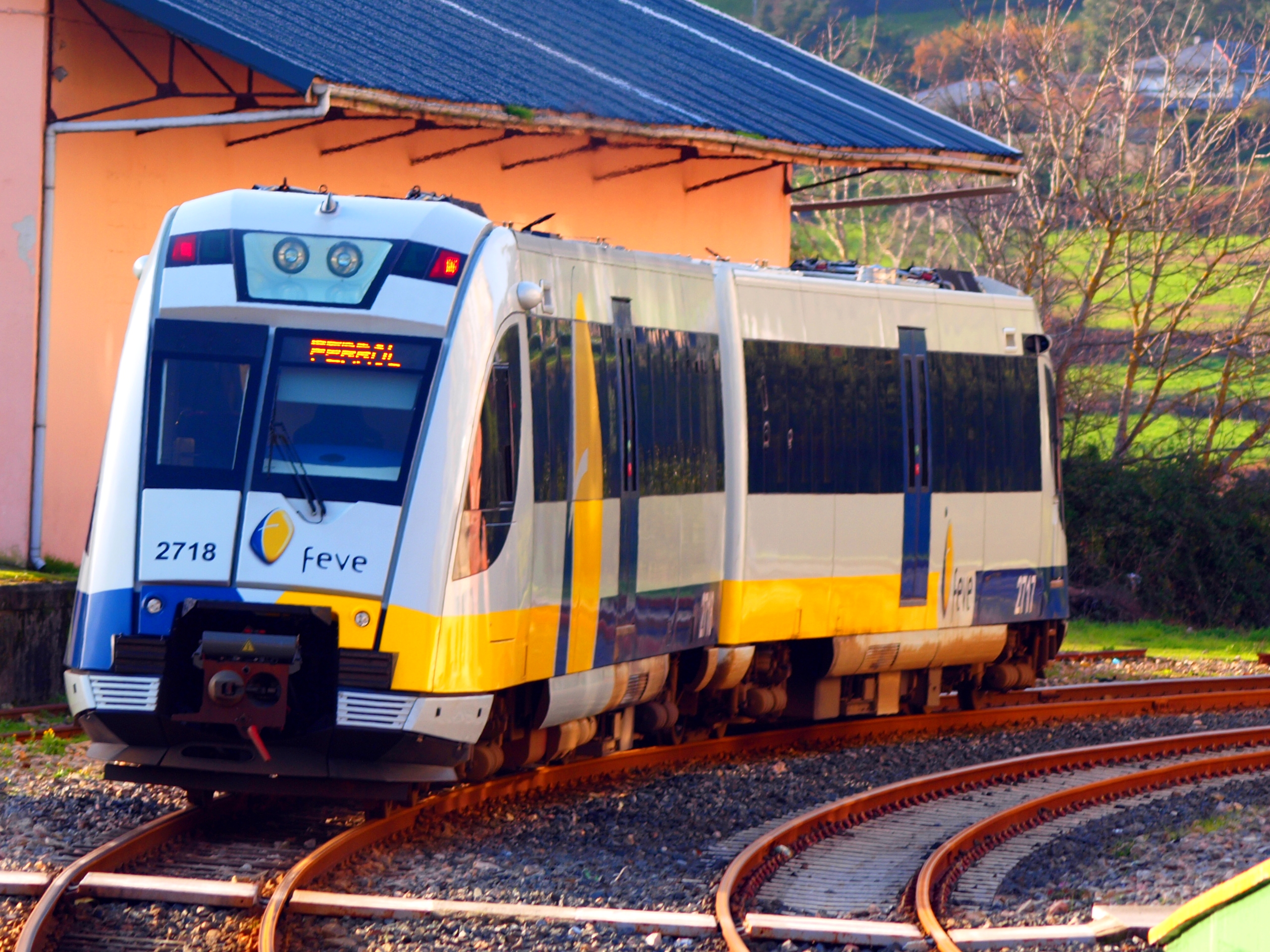 FEVE Series 2700 in Viveiro, Spain.